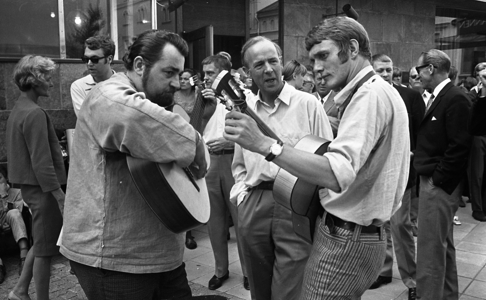 Vänsterpartiet Kommunisterna (VPK) håller valmöte på Södertorget i Örebro, inför valet till Riksdagens Andra Kammare 1968. Partiledaren C.-H. Hermansson i mitten, till vänster syns Cornelis Vreeswijk.